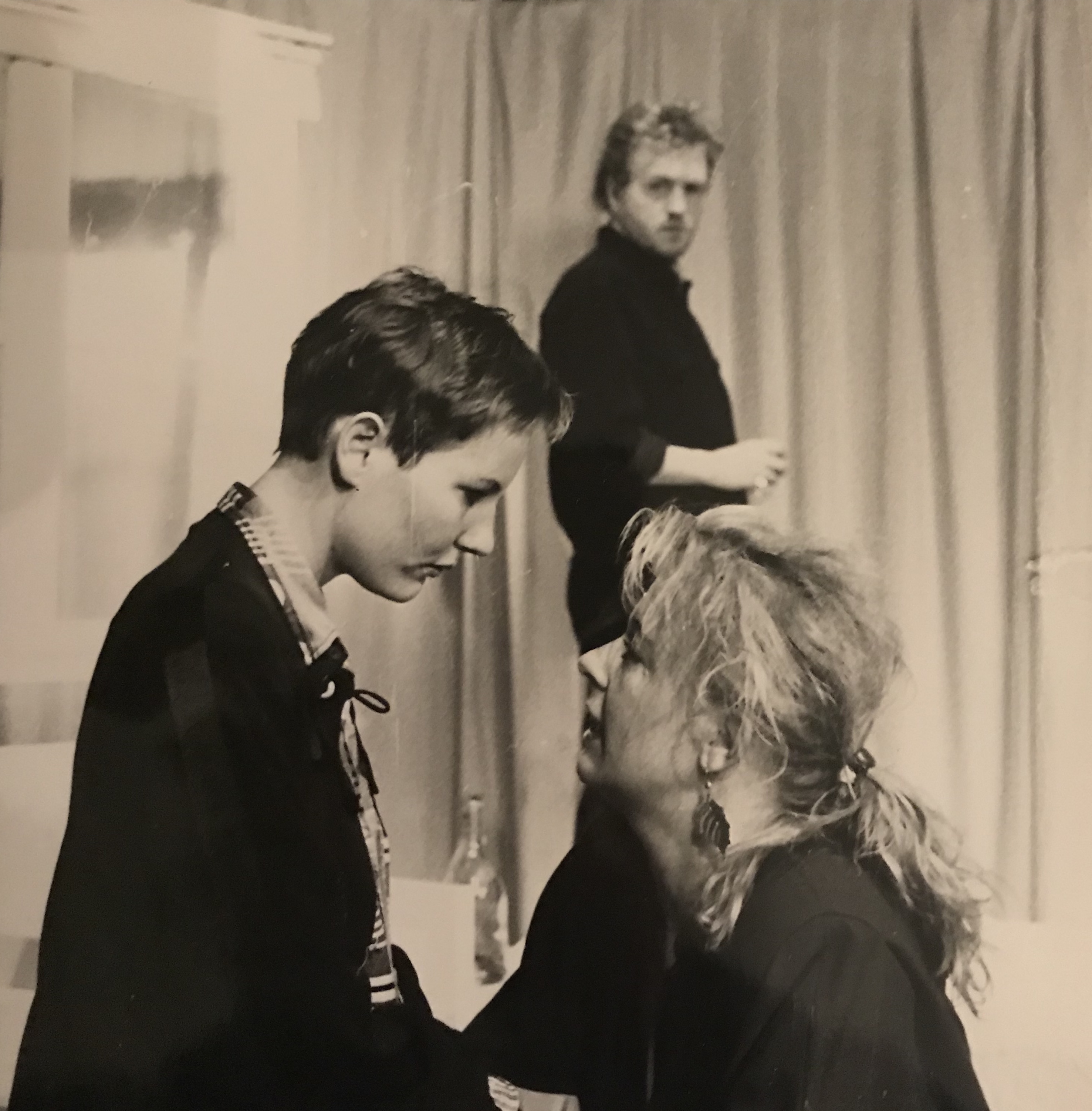 Scene fra H.Pinter, Den Danske Scenekunstskole 1989